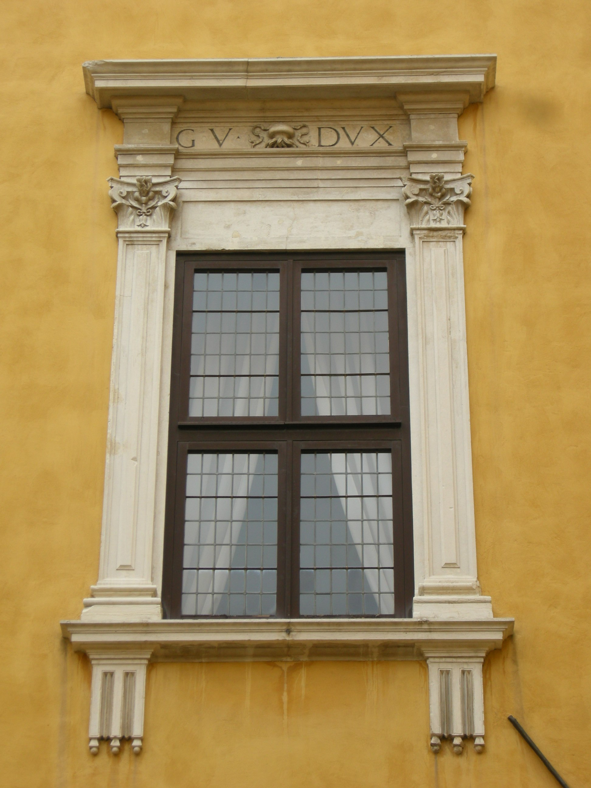 Pesaro, palazzo ducale, cortile 02 stemma guidobaldo della rovere